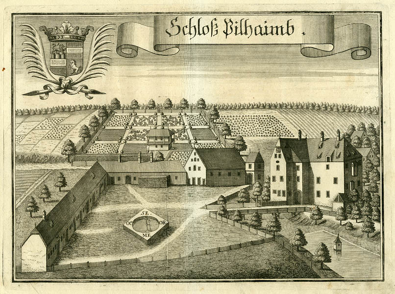 “Schloß Pilhaimb” (Pillham bei Ruhstorf an der Rott), aus : Beschreibung des Churfürsten- u. Hertzogthumbs Ober- und Nidern Bayrn. Rentamt Landshut, Gericht Griesbach, 1723